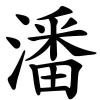 họ Phan viết bằng chữ Hán